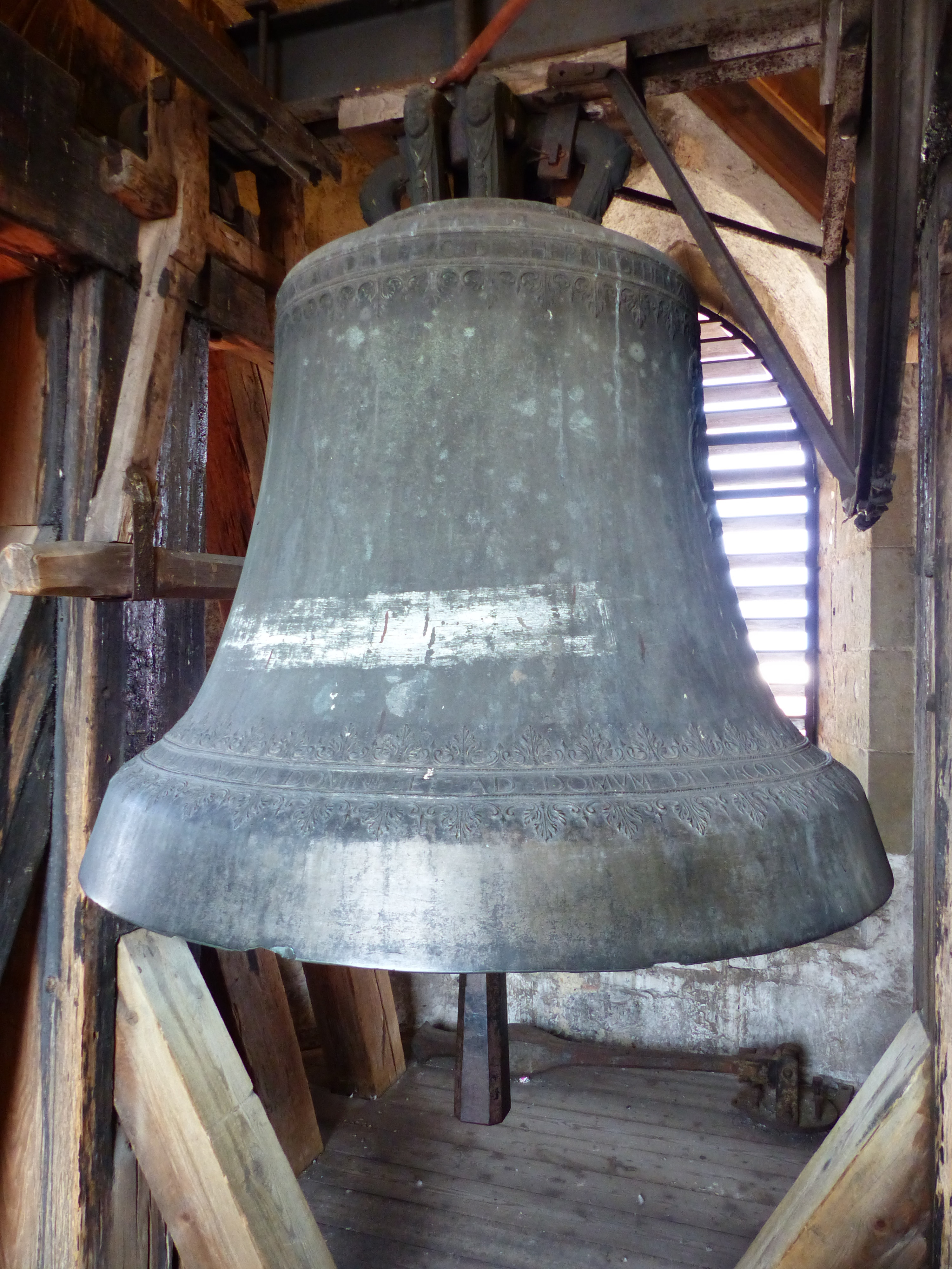 Dreieinigkeitskirche RegensburgThis is a photograph of an architectural monument.